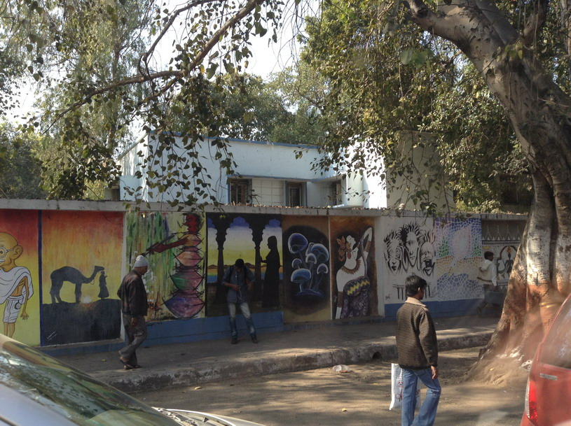 street art